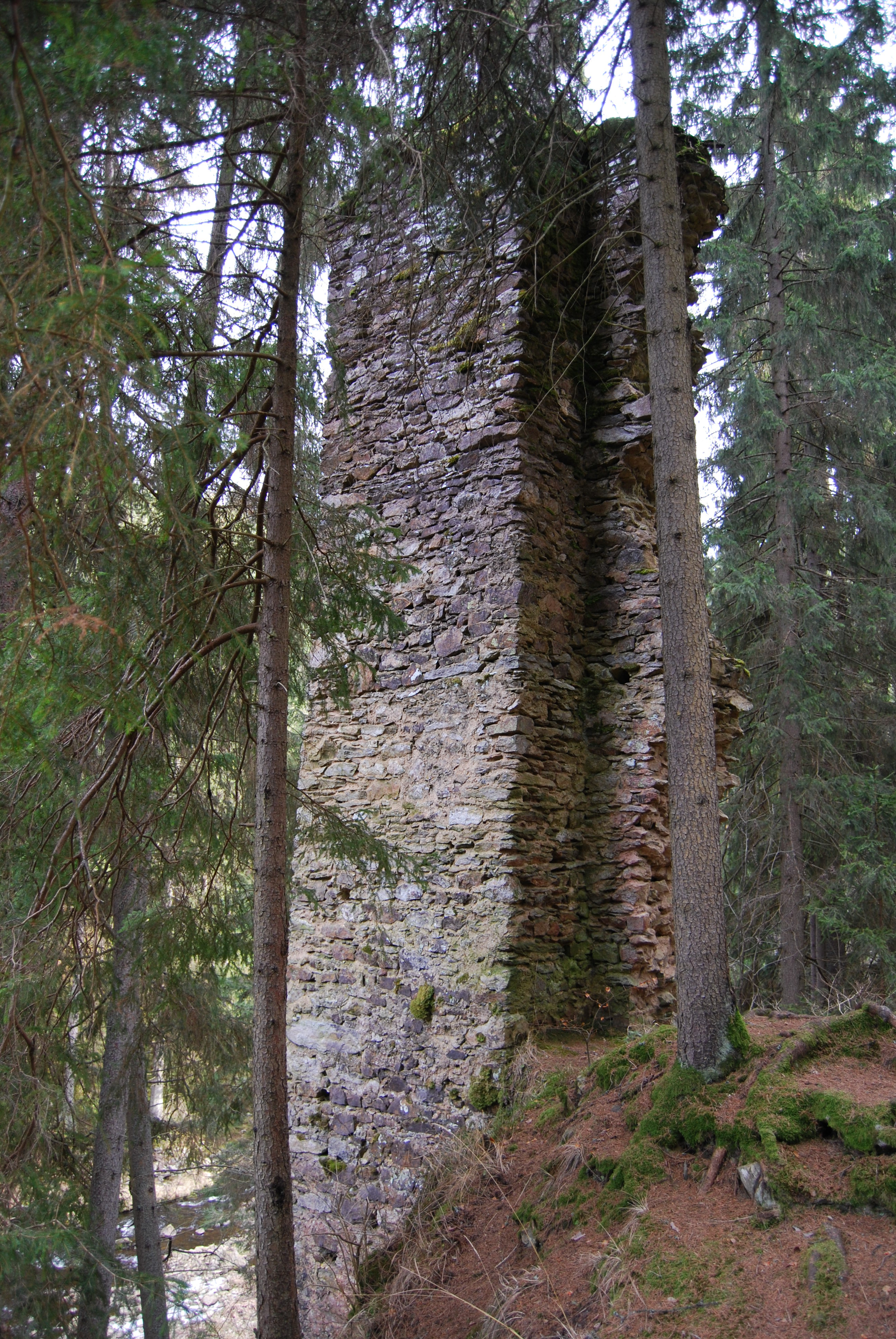 Hus - zřícenina hradu 2 km západně od Blažejovic v okrese Prachatice. Česká republika. - Google Maps - Google Earth